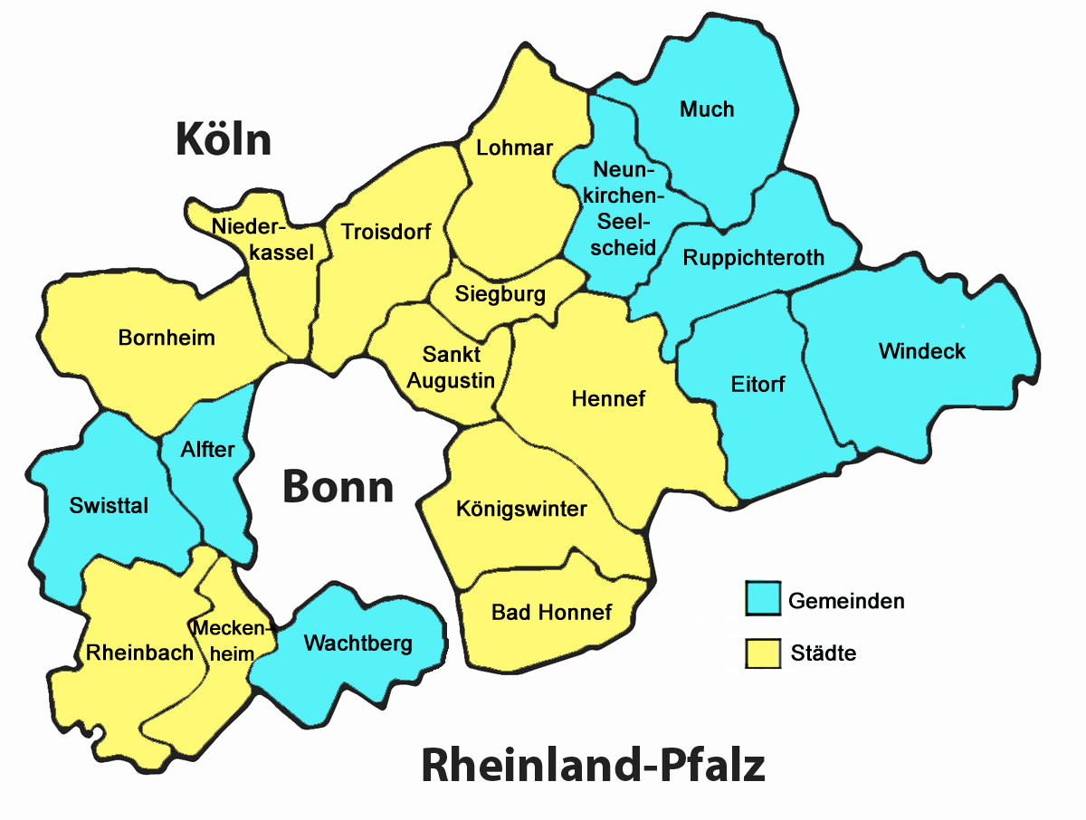 Rhein-Sieg-Kreis mit Städten und Gemeinden